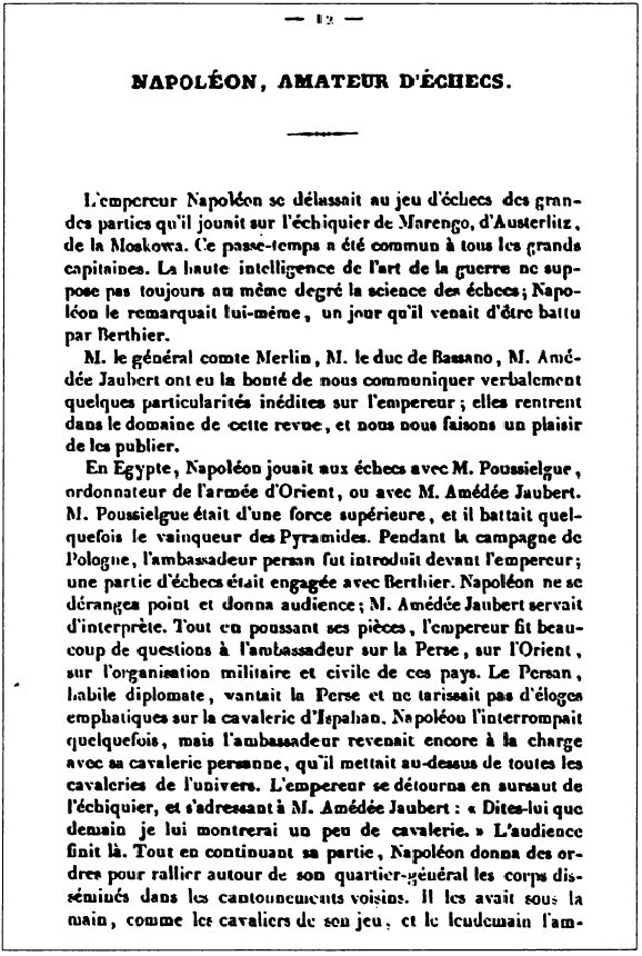 Линдер И. Последняя партия // Пушкин, любовь и шахматы. — М: Антидор, 1999. — С. 212. — 296 с. Le Palamède, 1836, pages 12